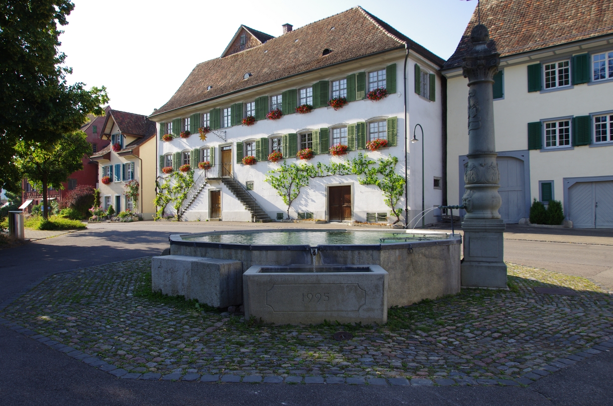 Kulturzentrum Sternen Thayngen / Ausstellungen / Museum (ab 2017) / ehemaliger Gasthof aus dem 17. Jahrhundert / Liegenschaft untersteht dem Kulturgüterschutz